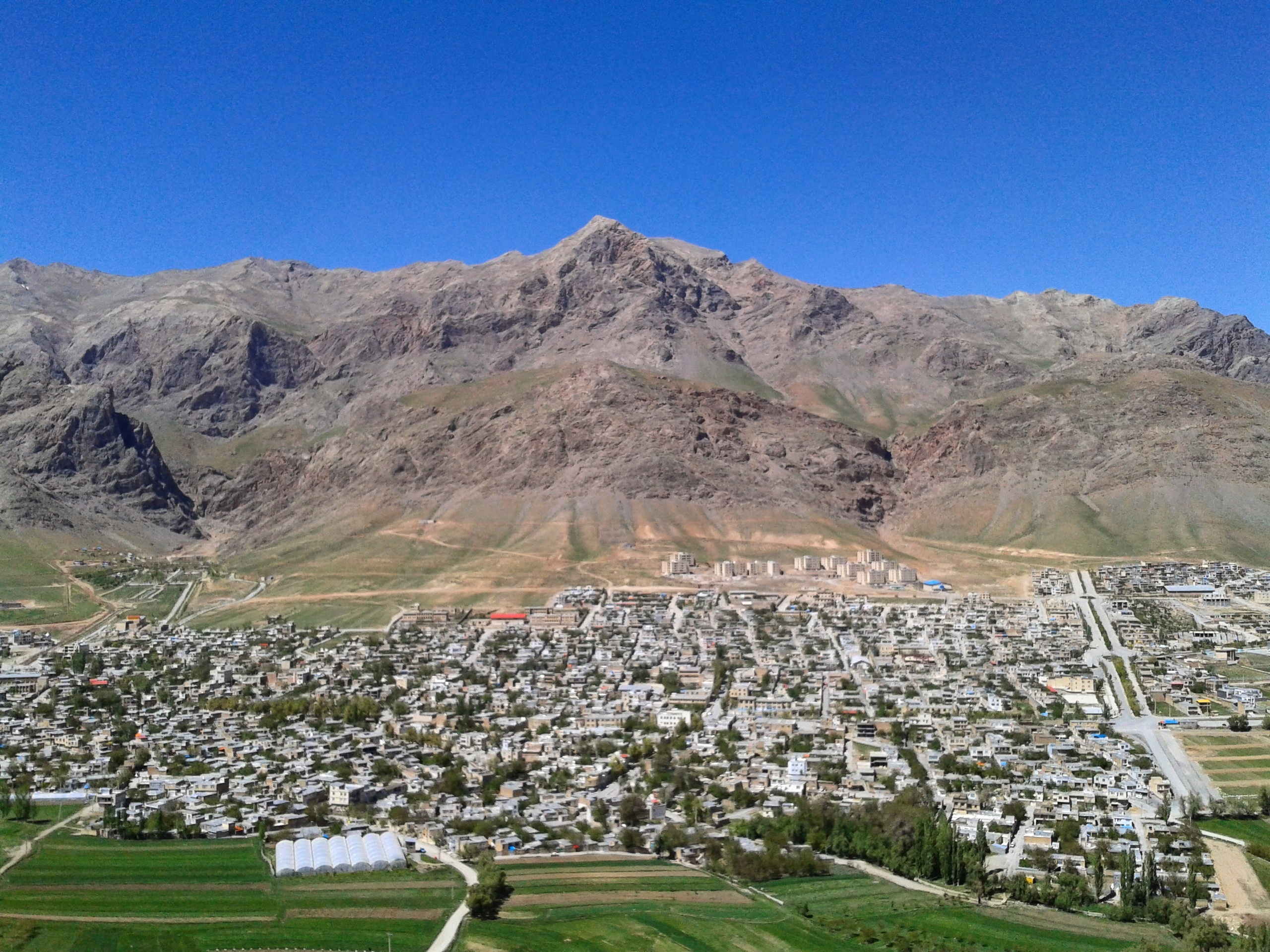 Fereydunshahr view from the Tatashvili